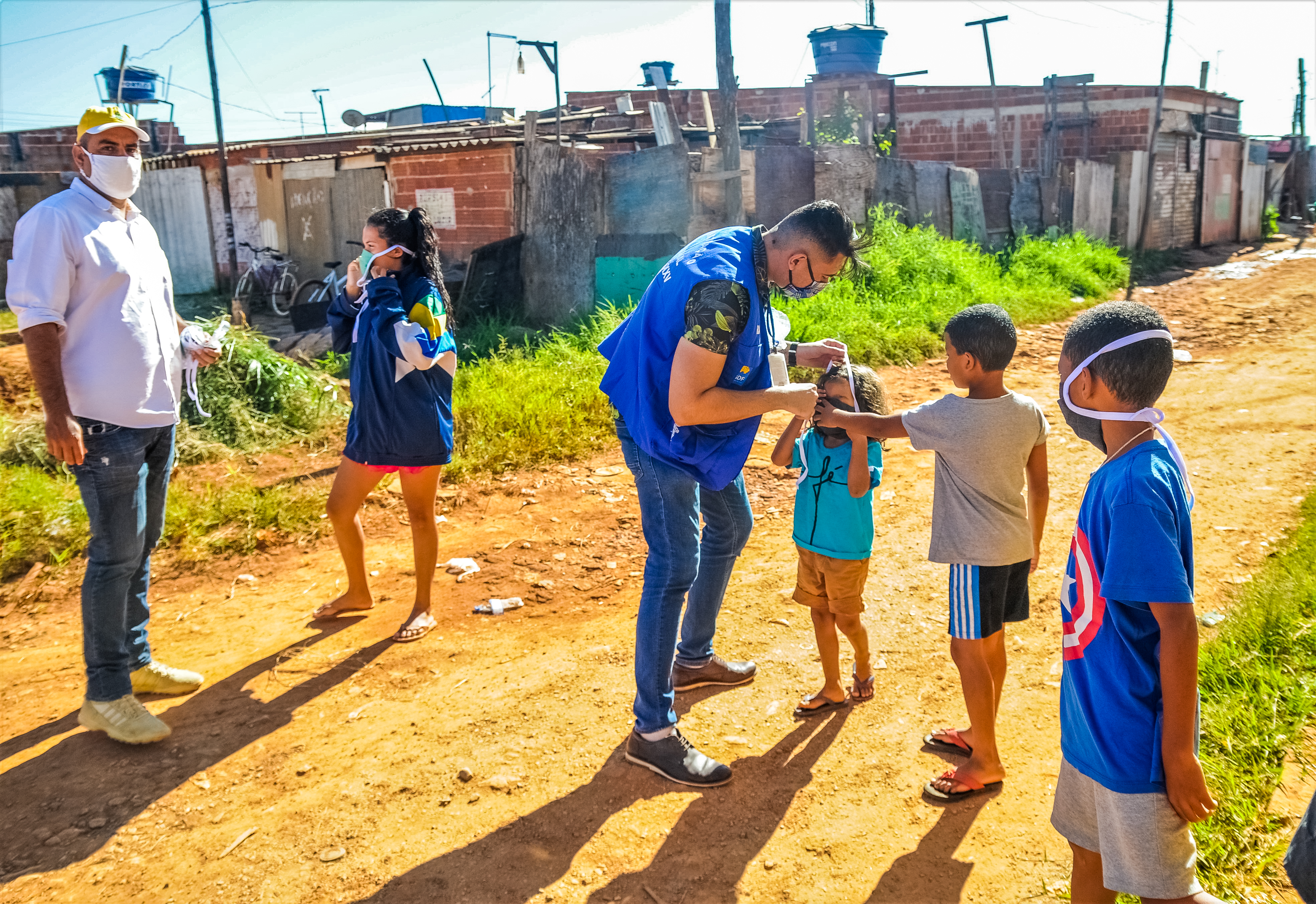 Para proteger contra a infecção por Covid 19, o uso de máscara é obrigatório no DF desde o dia 30 abril. Nesta semana, a Secretaria DF Legal, junto com servidores da Secretaria de Governo e policiais e bombeiros militares, está nas ruas reforçando a necessidade da prevenção. As equipes distribuem gratuitamente máscaras de tecido recicláveis. Pelo menos, por enquanto, não haverá aplicação de penalidade para quem estiver sem o protetor facial. Na foto Cidade Estrutural. Foto: Lucio Bernardo Jr/Agência Brasília